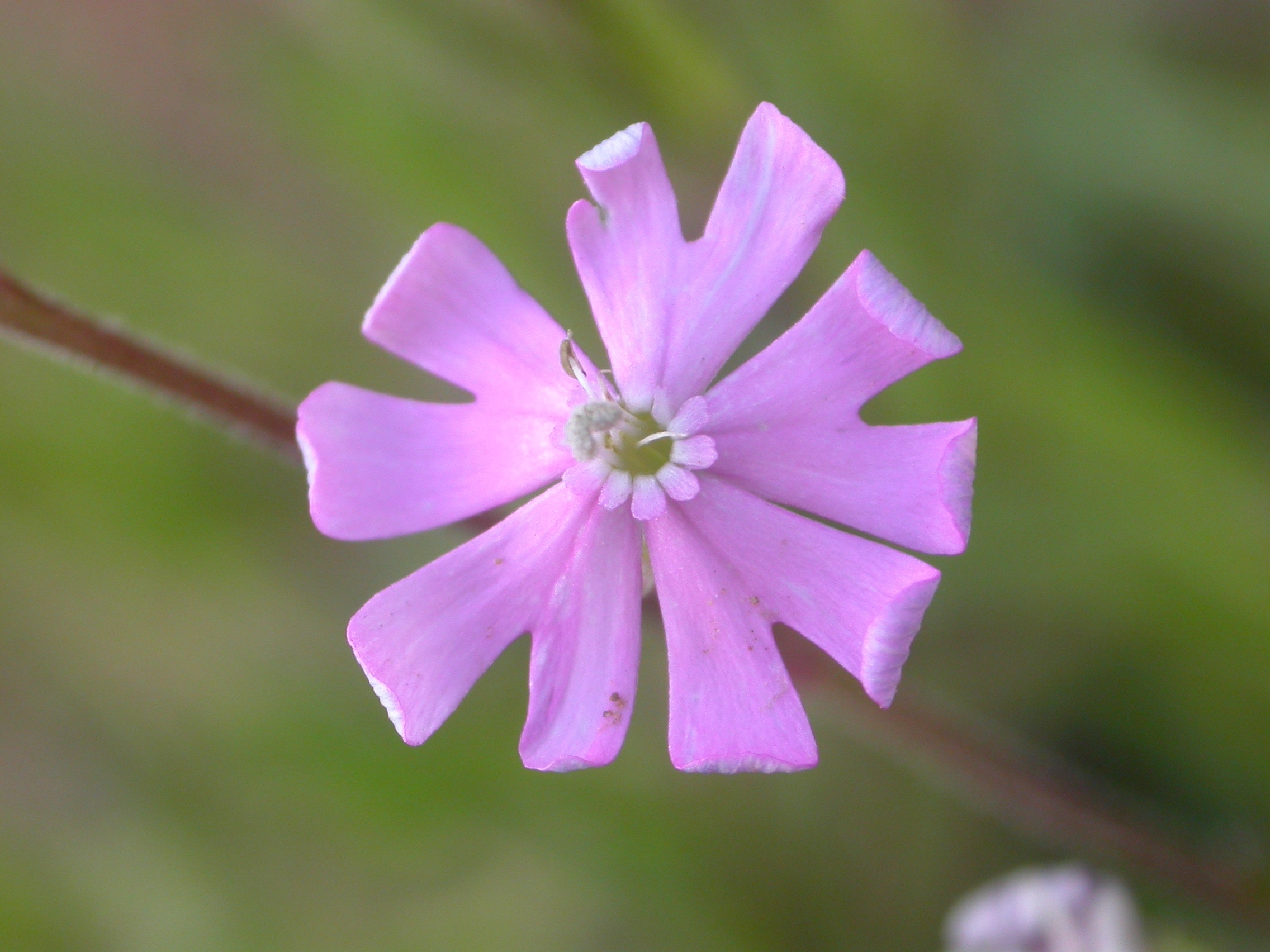 Silene mariana un endemismo de Sierra Morena